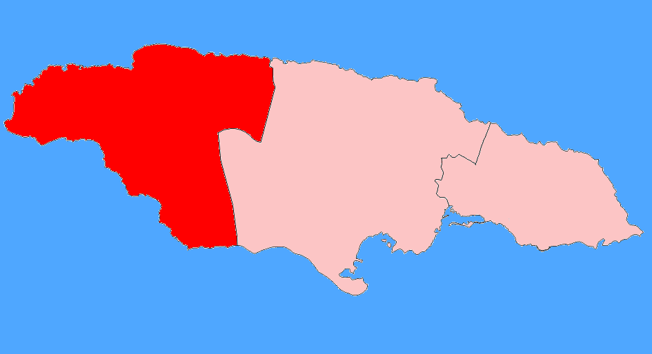 Condado de Cornwall, Jamaica.